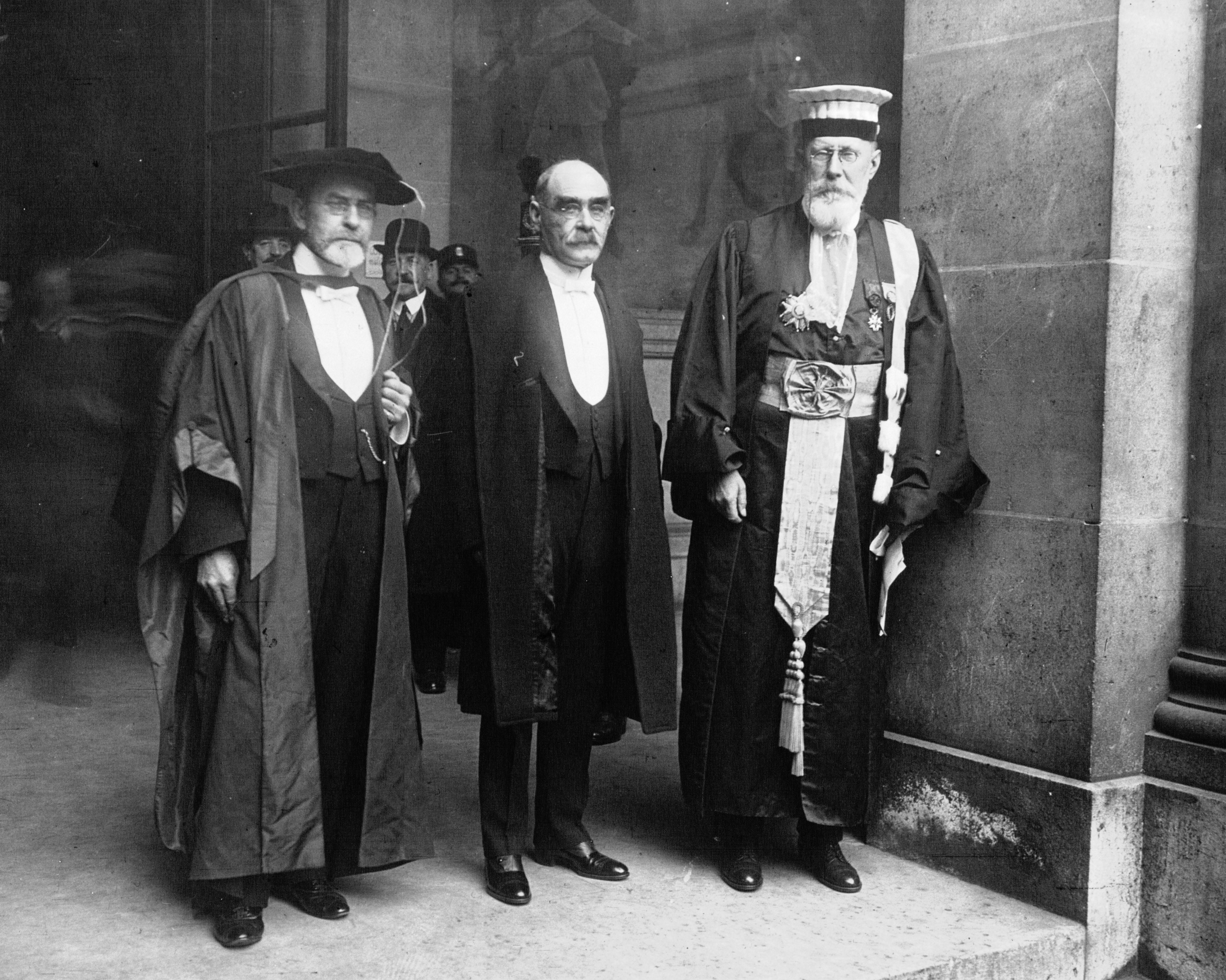 Réception à la Sorbonne de Rudyard Kipling et Frazer, écrivains anglais : de gauche à droite, Frazer, Kipling et Appell, recteur à la Sorbonne : photographie de presse